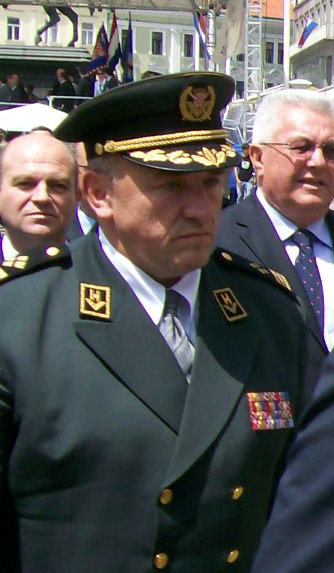 General Josip Lucić